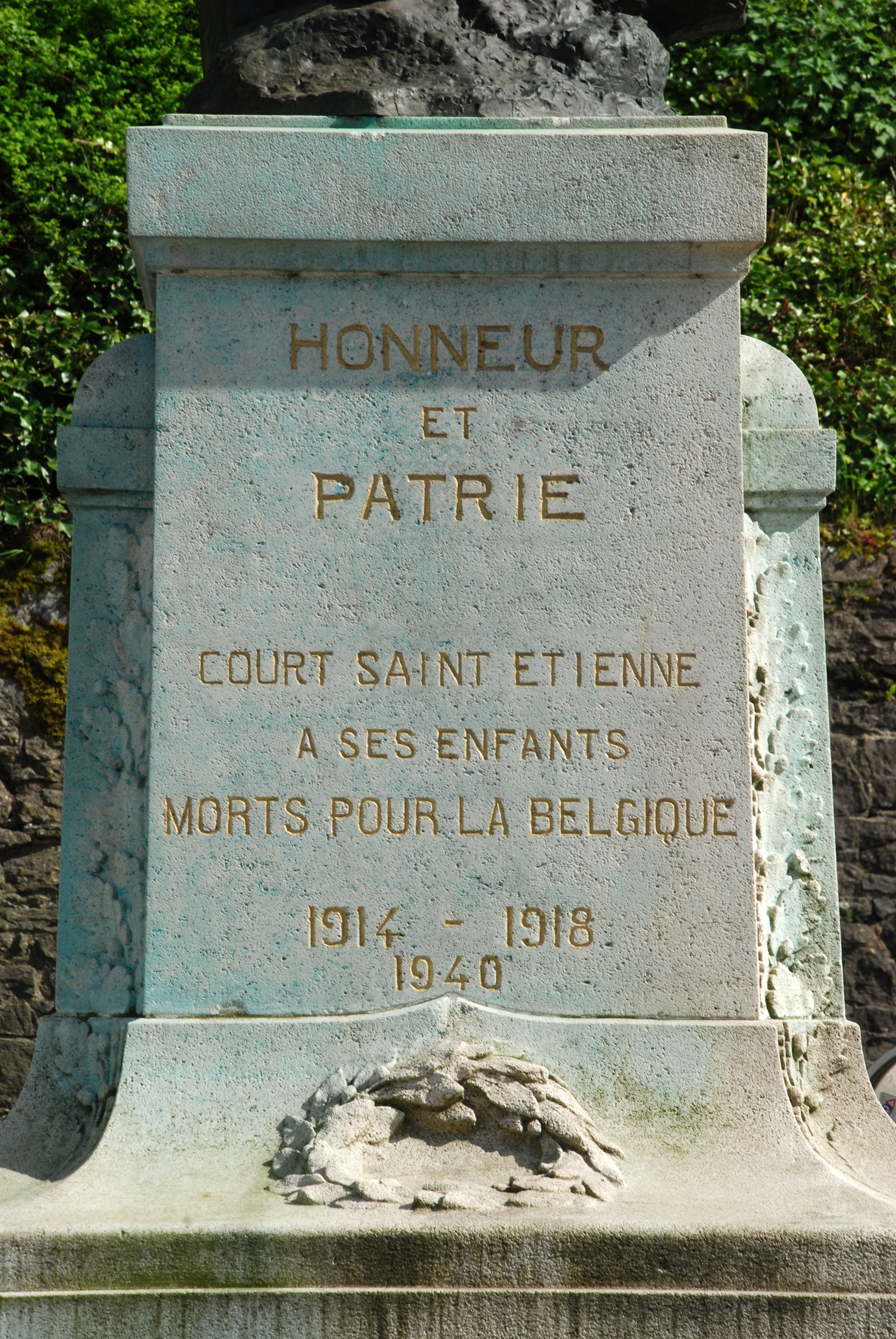 Belgique - Brabant wallon - Monument aux Morts de Court-Saint-Étienne